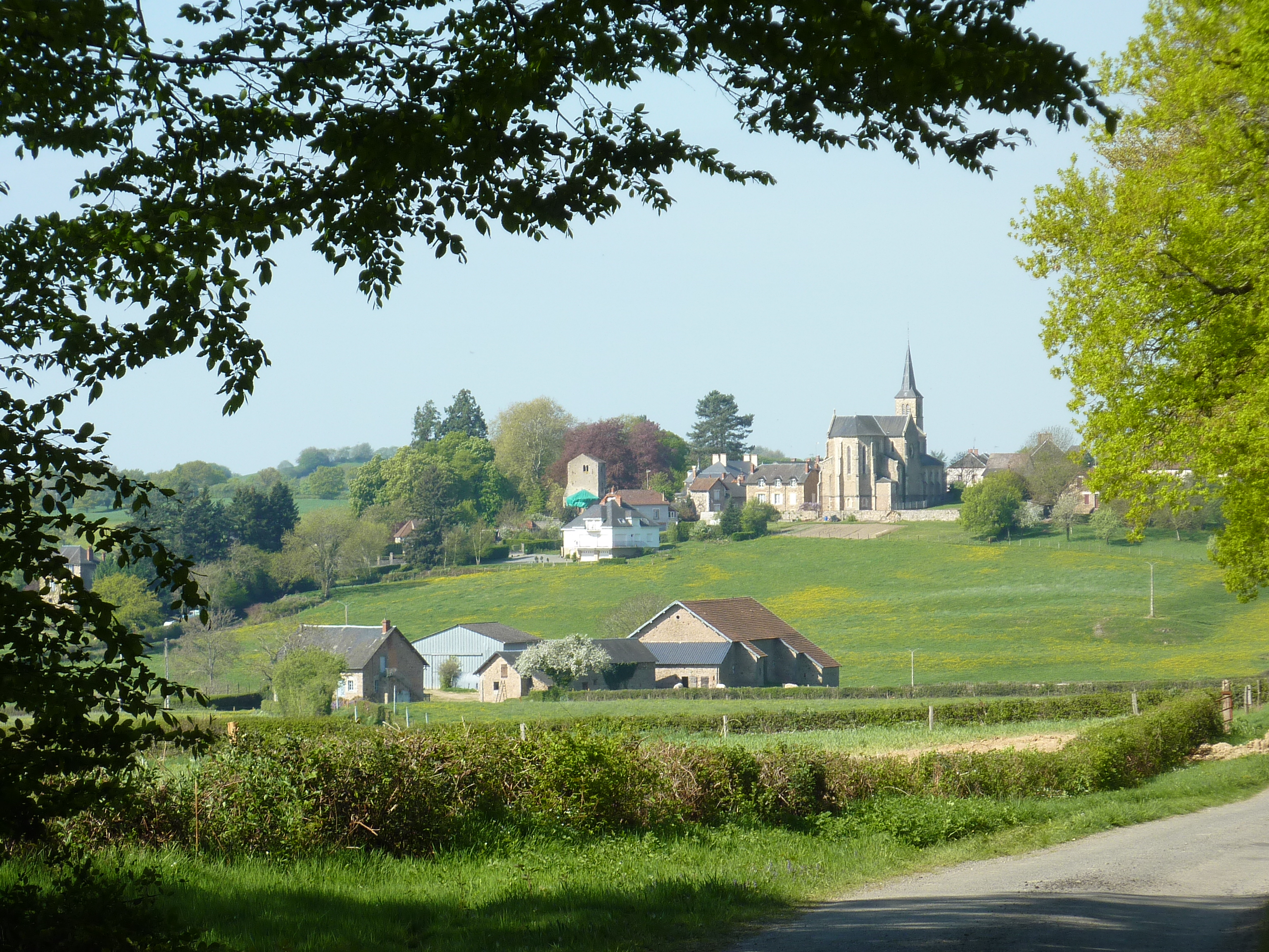 Chiddes (Nièvre) : le village vu de l'est